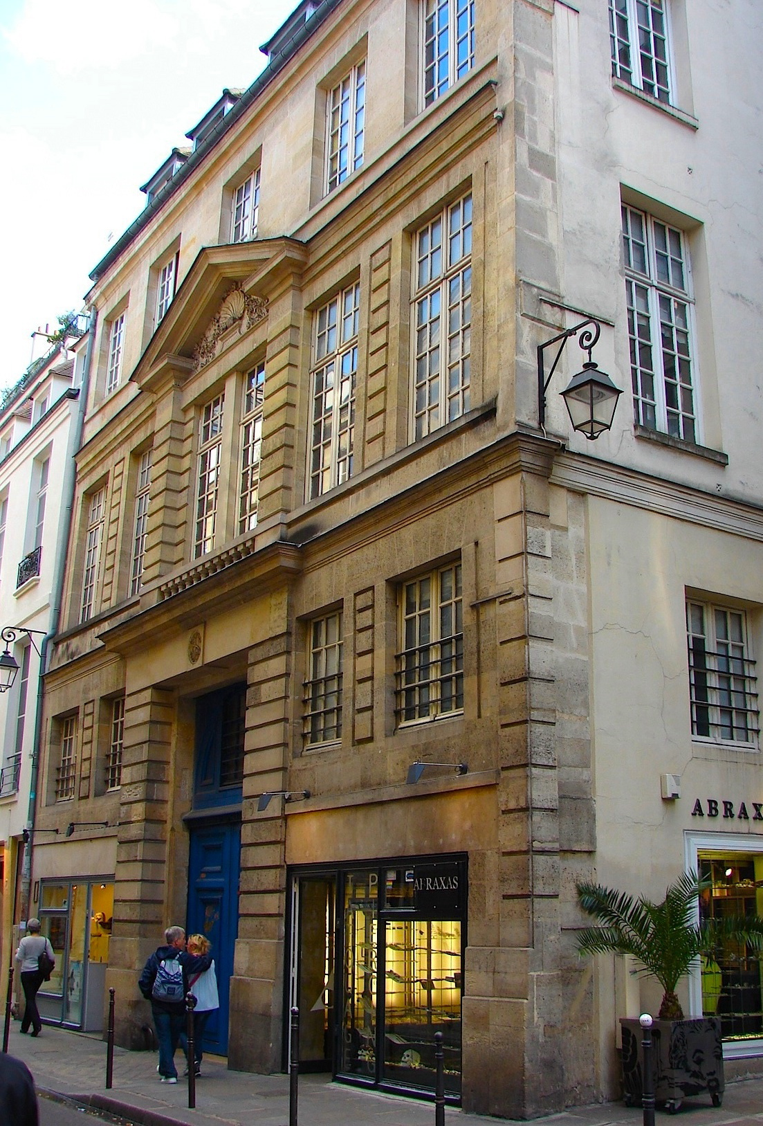 Hôtel Pottier de Blancmesnil - 9 rue Saint-Merri - Paris 4 Façade principale sur la rue .